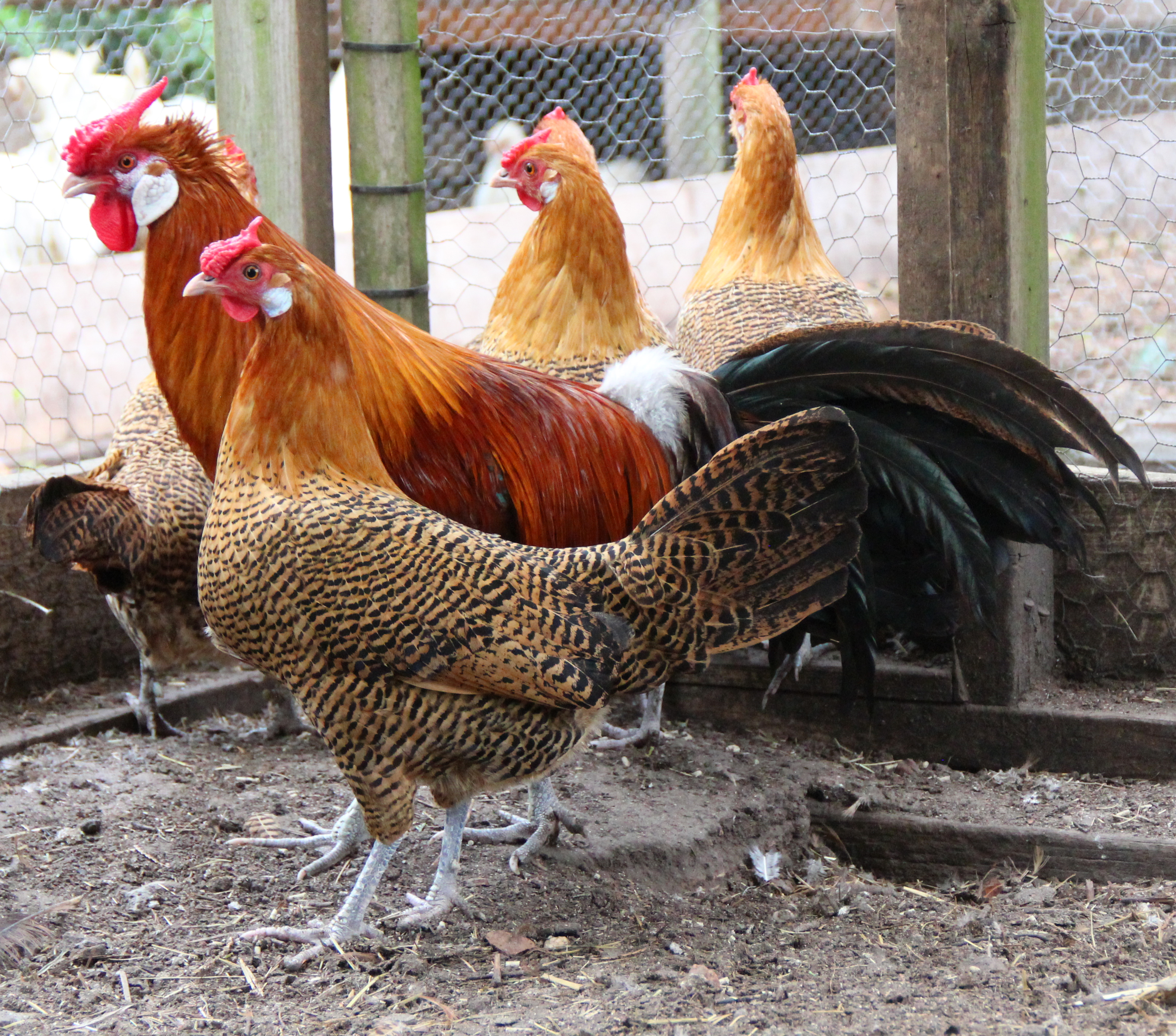 Stam Assendelfters